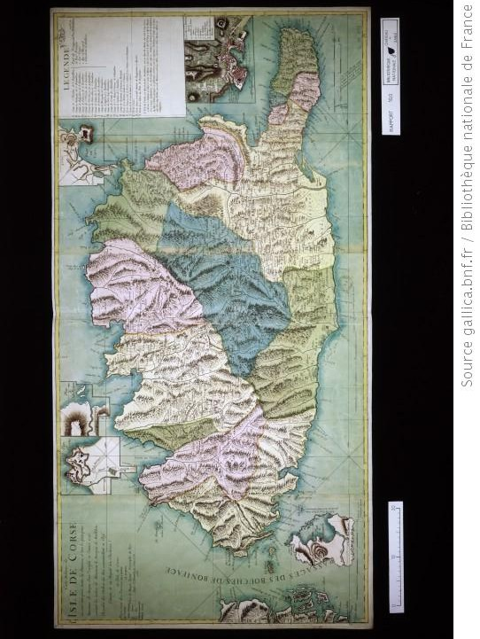 Carte de l'île de Corse où sont marquées toutes les paroisses et tous les principaux hameaux de chaque pieve en 1740 (1768)